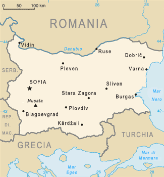 Mappa della Bulgaria in italiano.